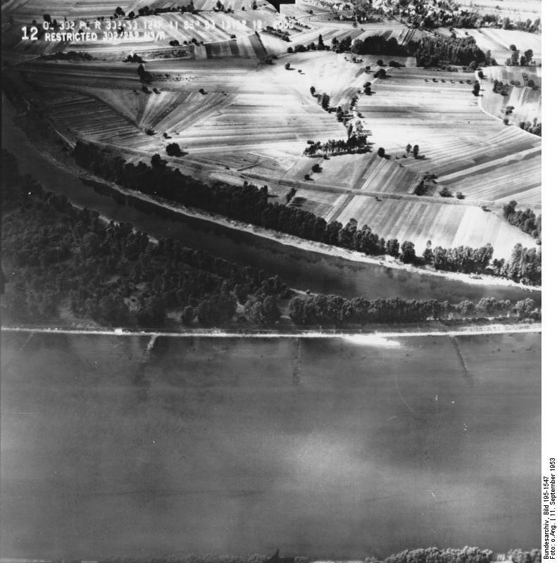 Rheinbefliegung der Alliierten 1953